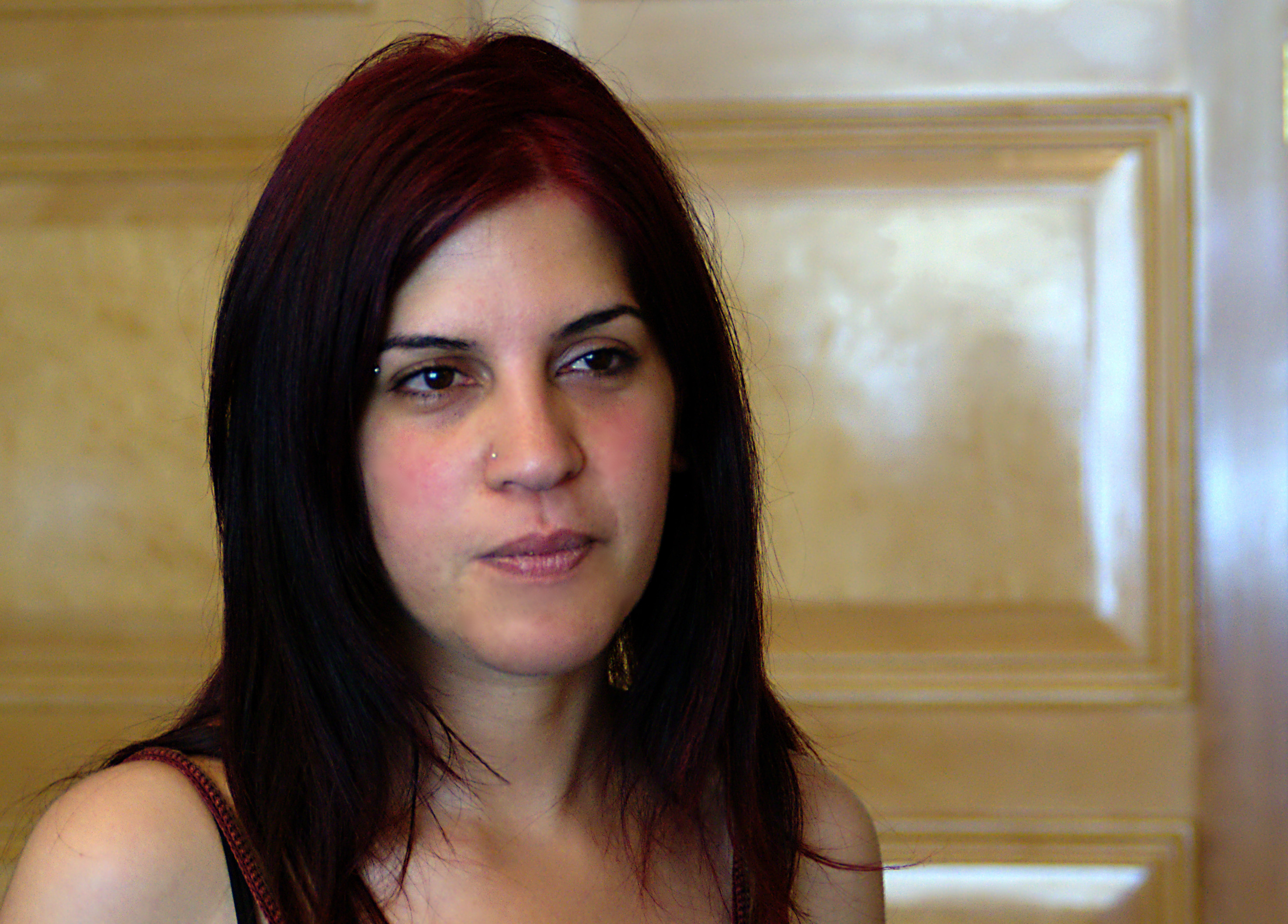 Lina Ben M'henni à la conférence de Tunis Freedom Online